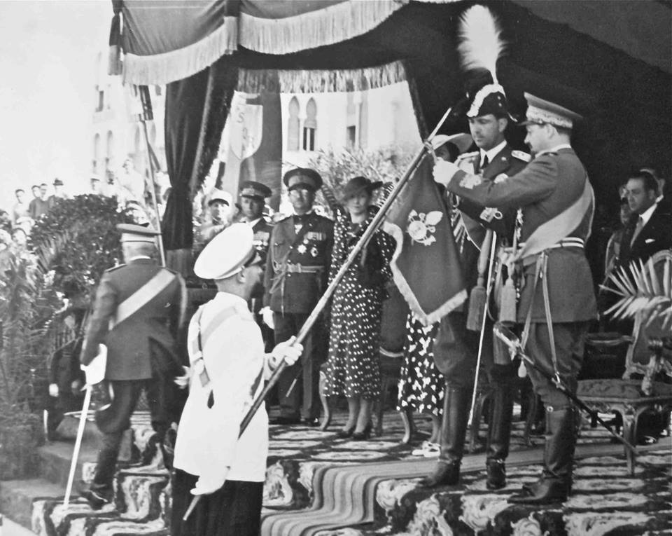 S.A.R. il Principe di Piemonte Umberto, decora una Bandiera della Regia Marina durante una cerimonia di Giuramento dei nuovi cadetti